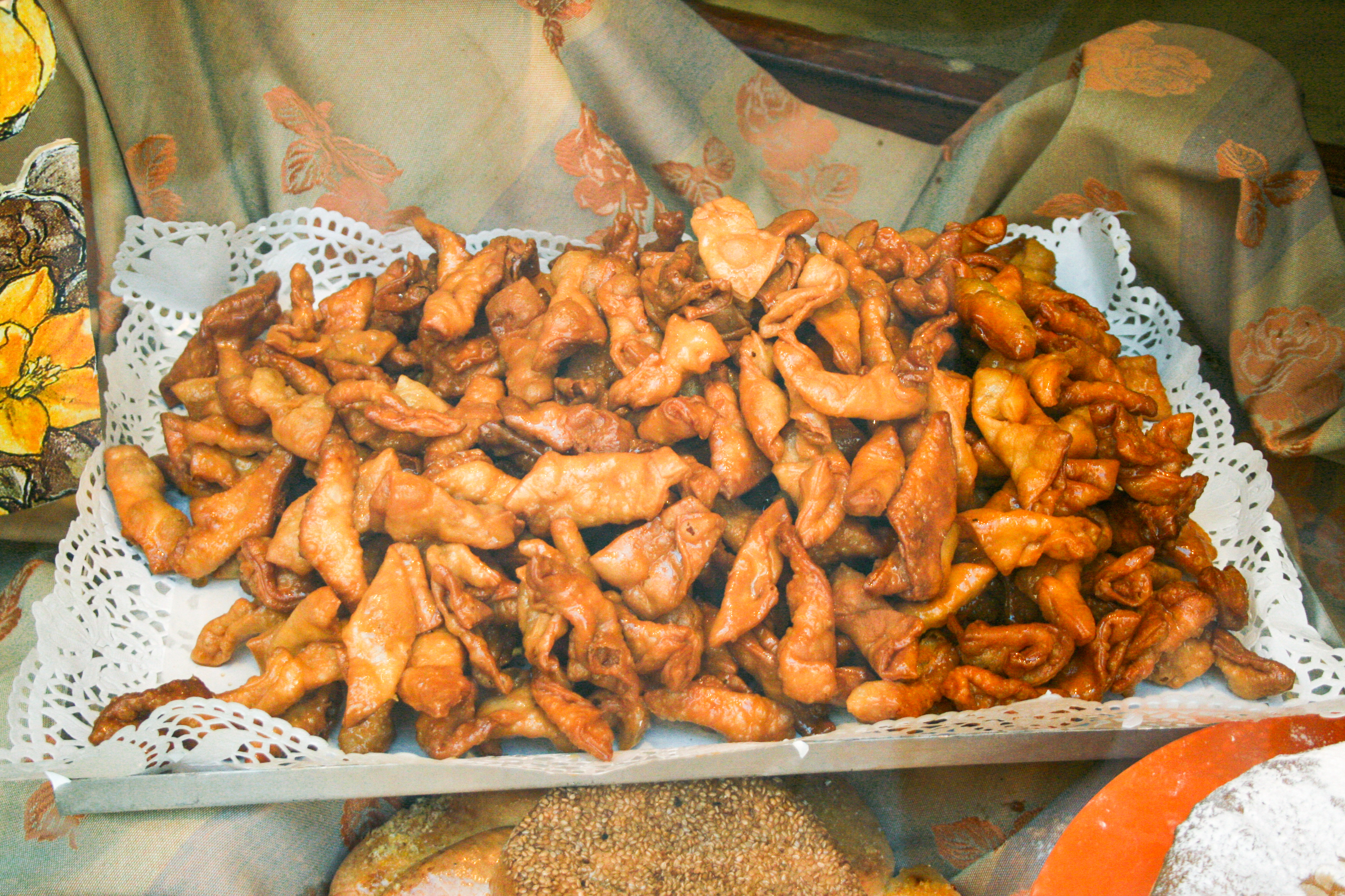 Pestiños